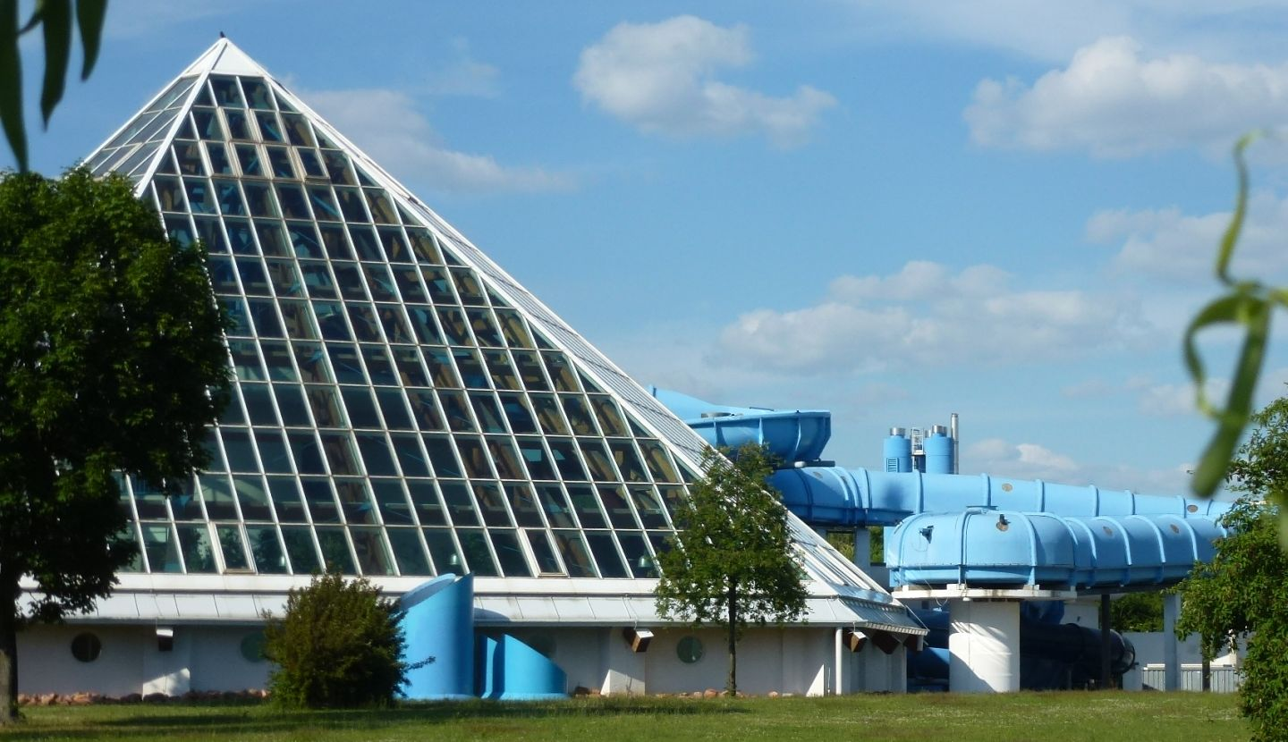 Freizeitbad Riff in Bad Lausick